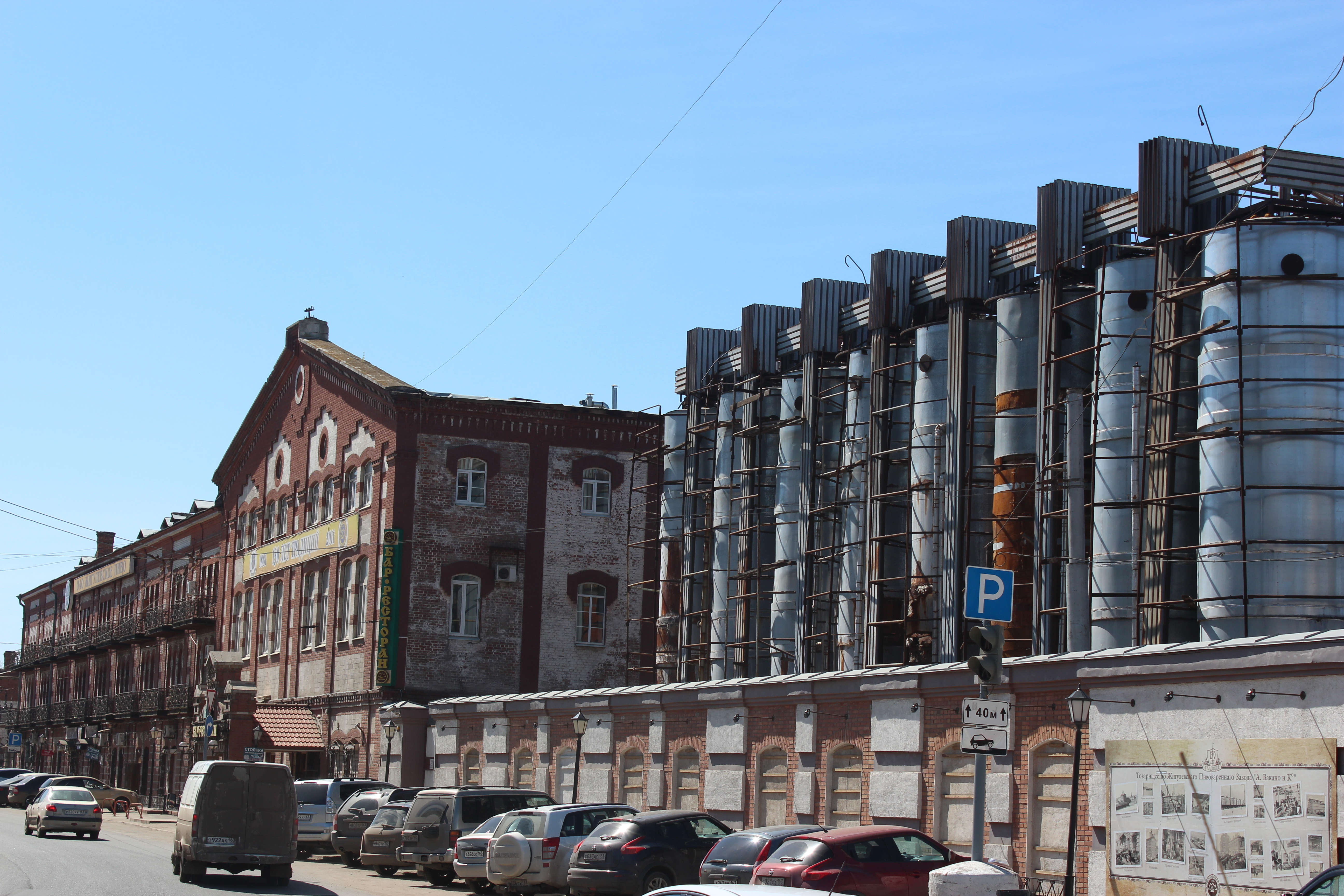 Корпус производственный жигулевского пивоваренного завода (Самарская область, Самара, Волжский проспект, 4)